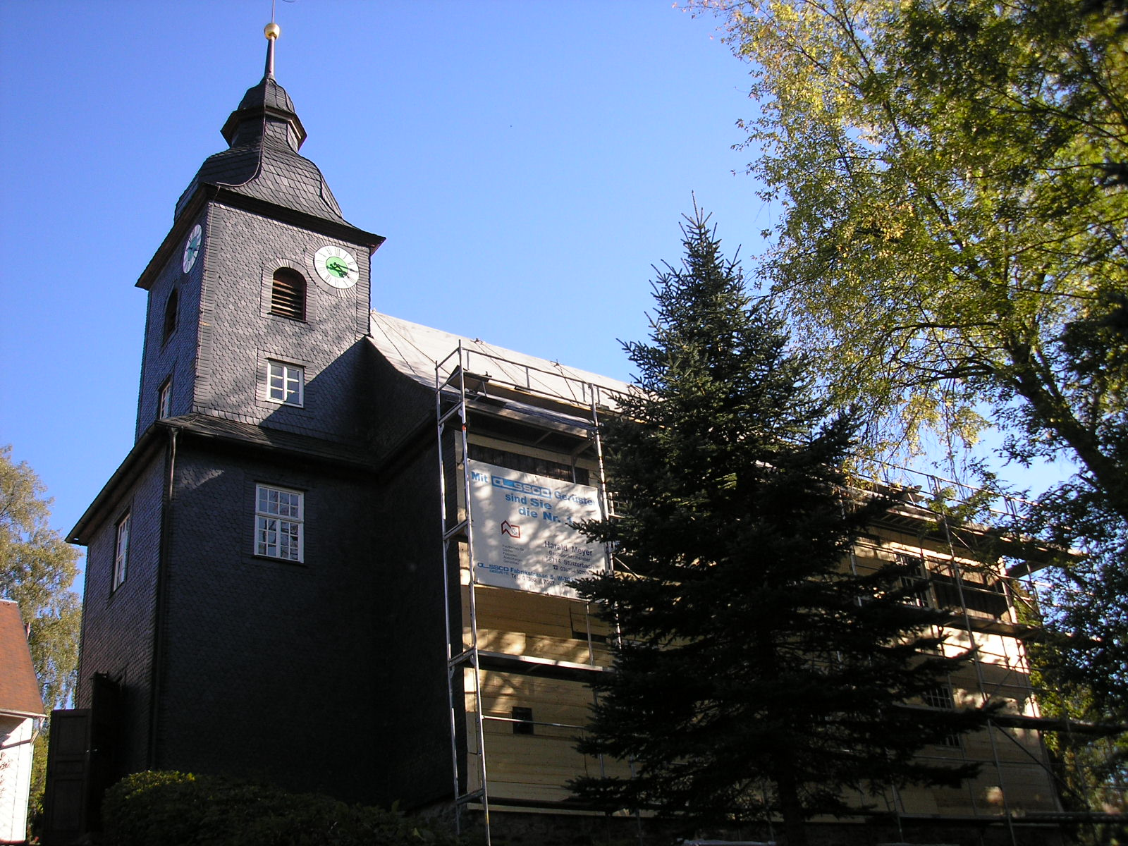 Weimarische Kirche in Stützerbach (Thüringen).